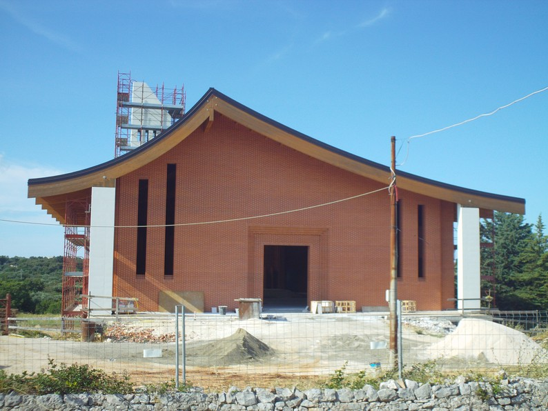 Foto rilasciata dalla Parrocchia "Santa Maria del Rosario" in Cozzana presente sul sito ufficiale e inserita con l'autorizzazione del Parroco.